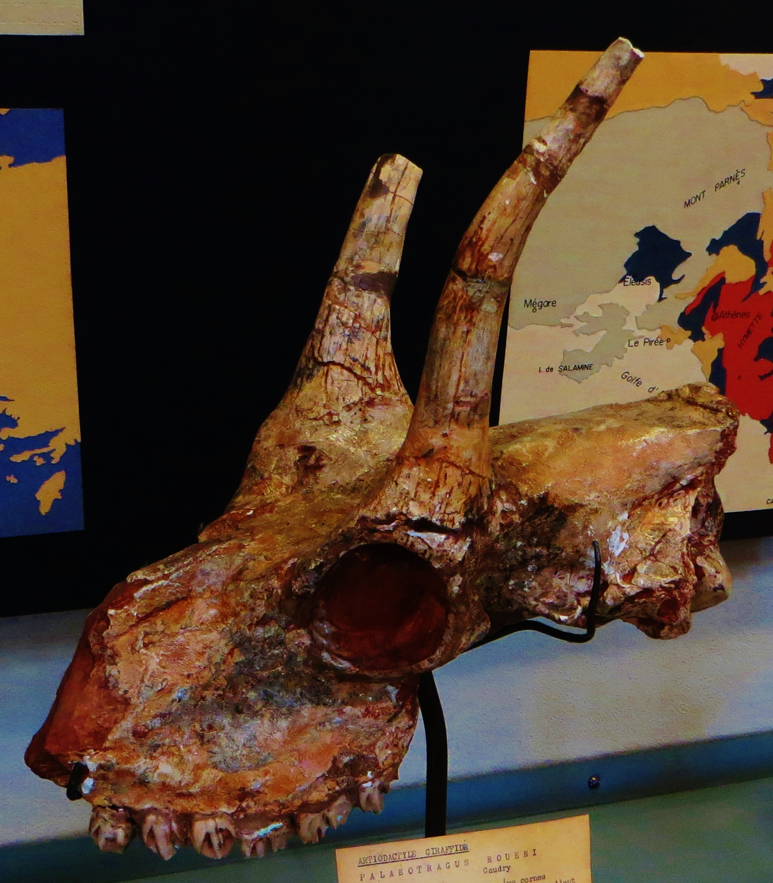 Fossil of Palaeotragus, an extinct mammal - Took the photo at Musee d'Histoire Naturelle, Paris